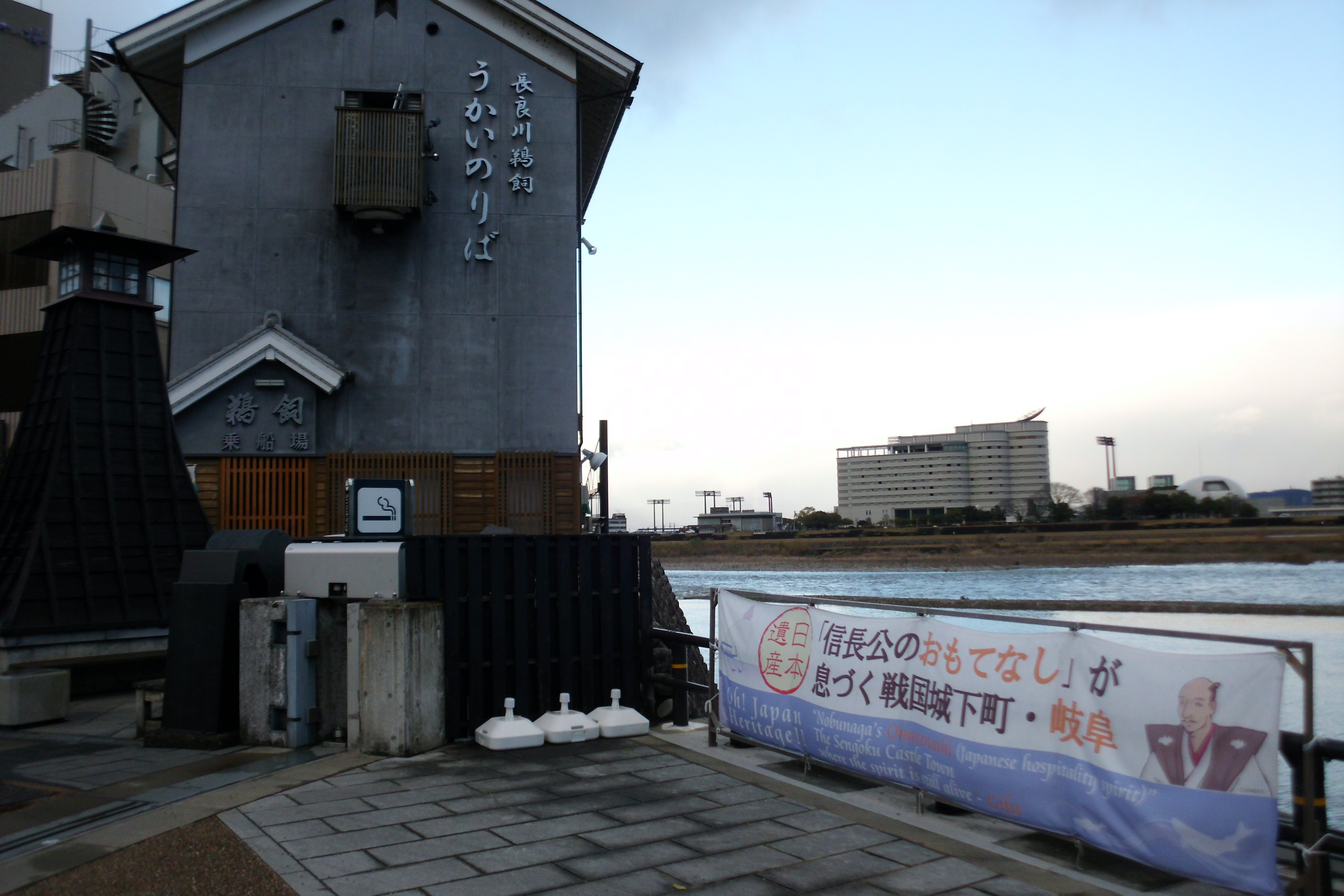 日本遺産「”信長公のおもてなし”が息づく戦国城下町・岐阜」の横断幕、鵜飼い舟乗り場脇